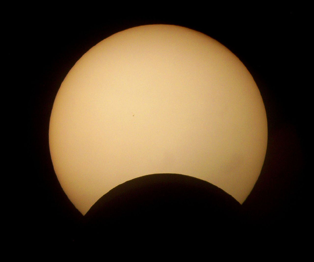 Partial solar eclipse